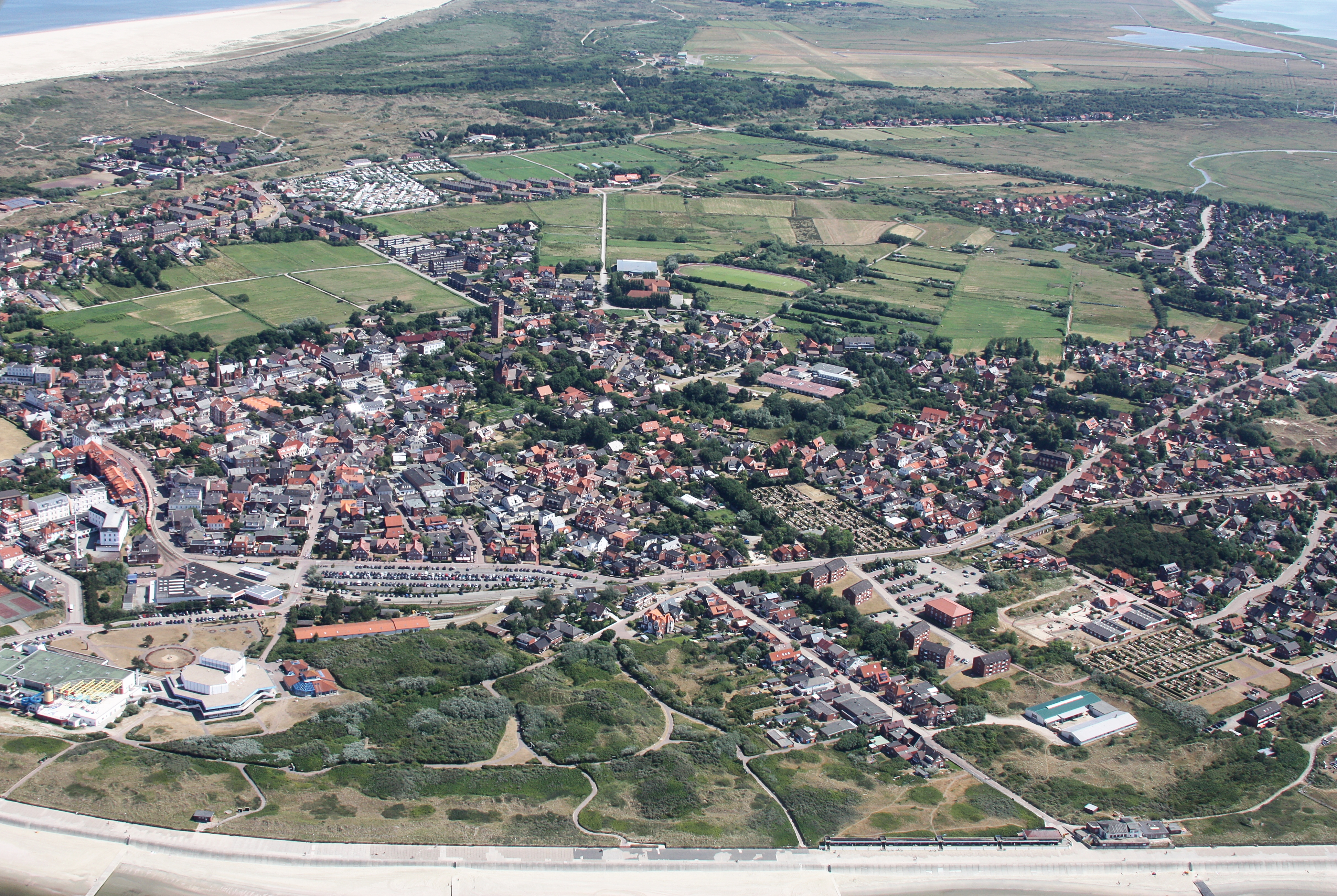 Flug über Borkum; Flughöhe 1500 ft; Juli 2010; Originalfoto nachbearbeitet: Tonwertkorrektur und Bild geschärft mit Hochpassfilter